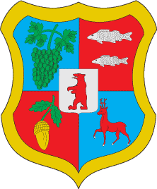 Герб Іршавського району